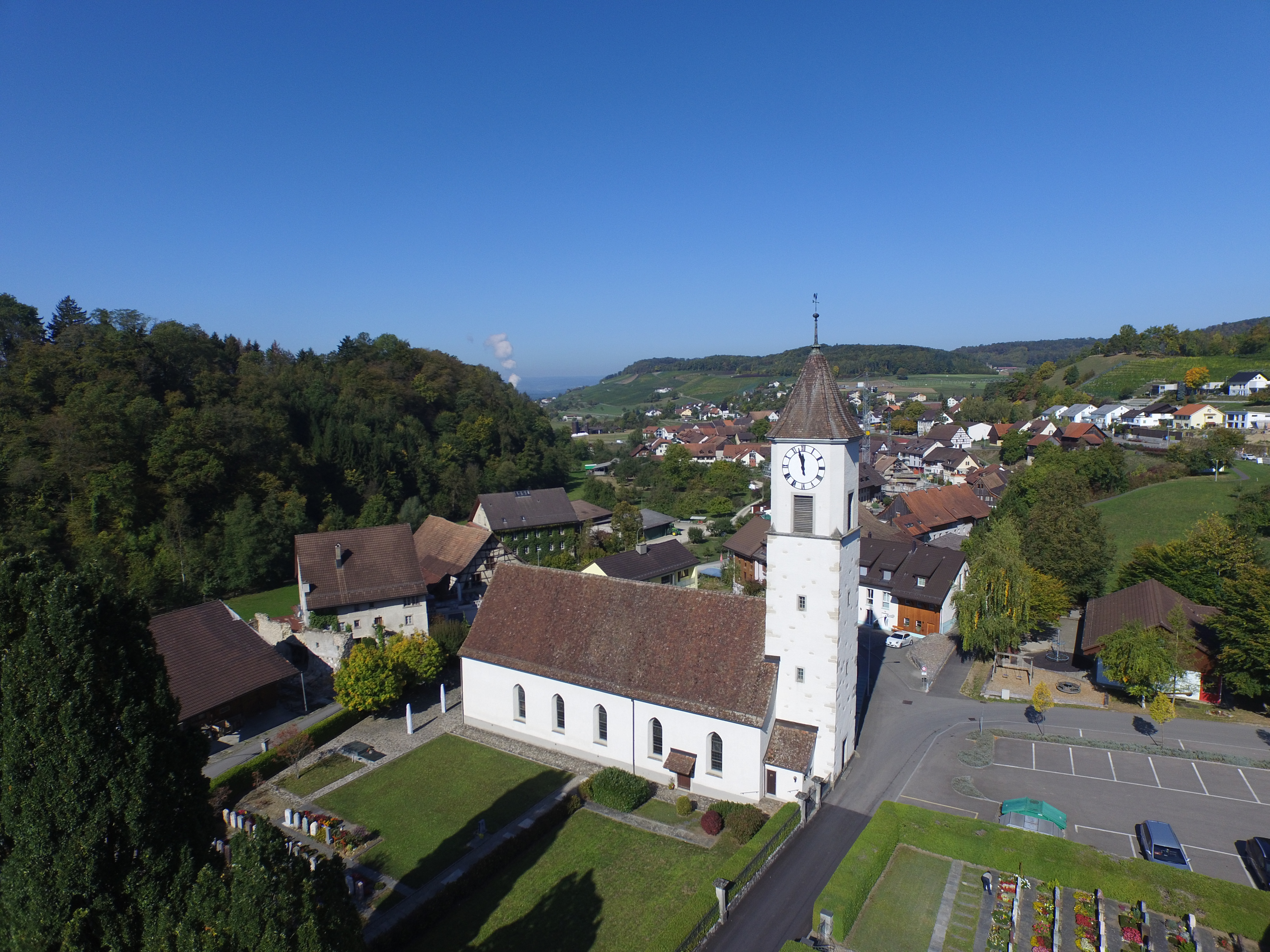 Reformierte Kirche Tegerfelden